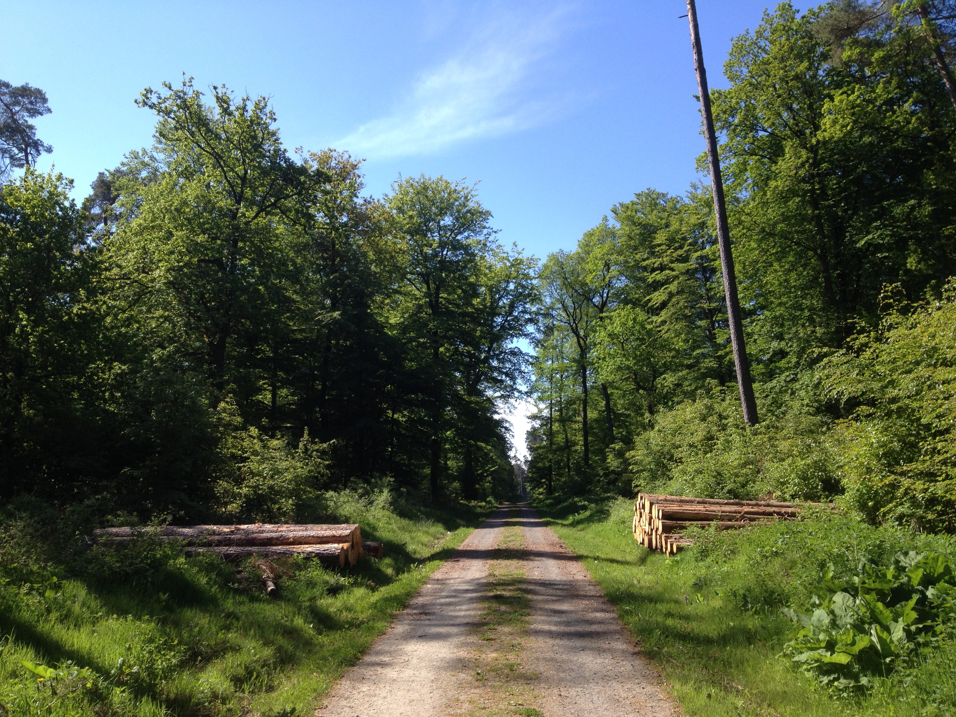 Der Habichtswaldsteig, der Barbarossaweg (X12) und der Eco Pfad Archäologie Naumburg auf Schotterwegen zwischen Weidelsburg und Naumburg (Hessen)